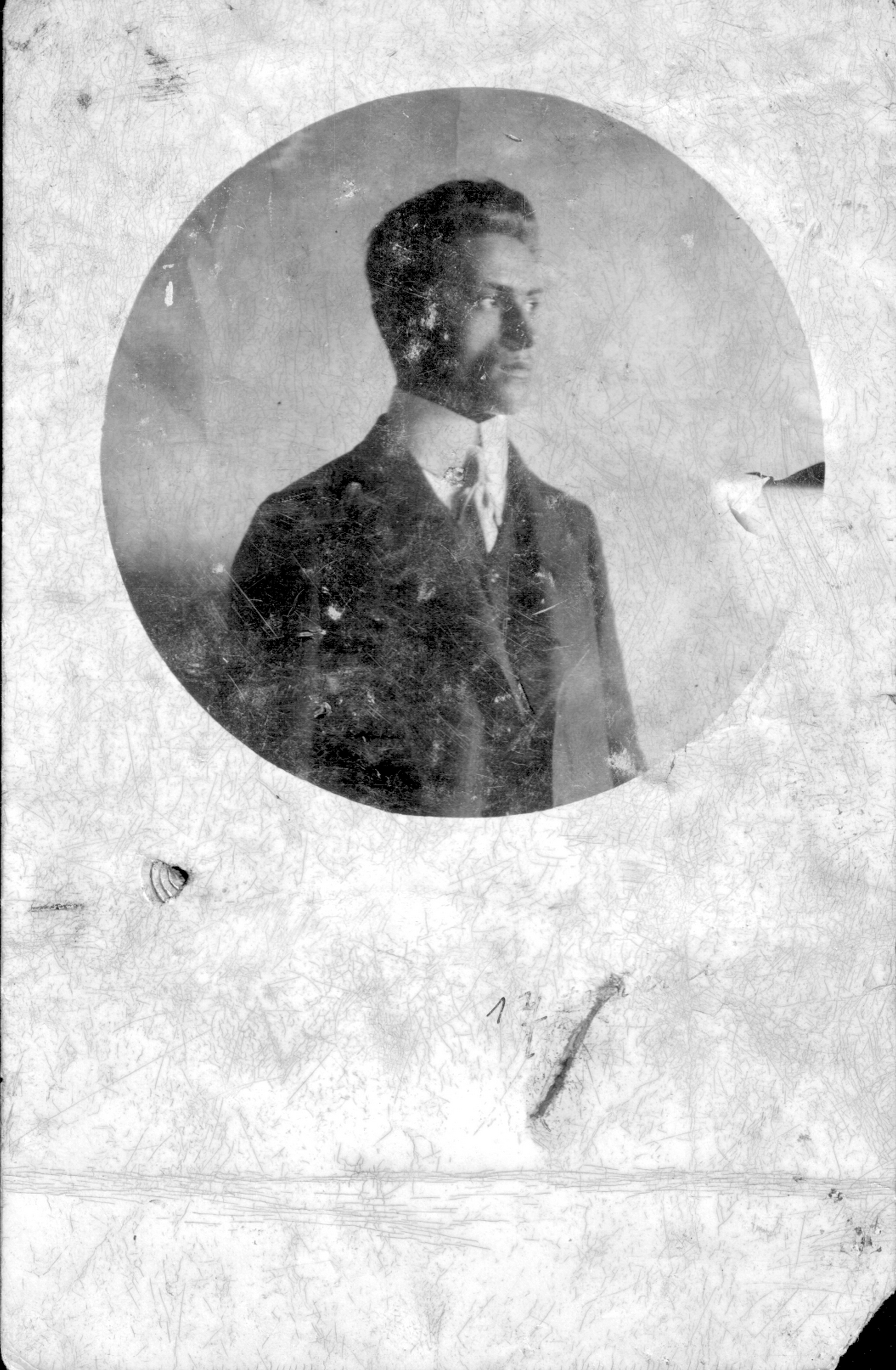 Stanisław Krzyżowski w Roku Grunwaldzkim (1910)